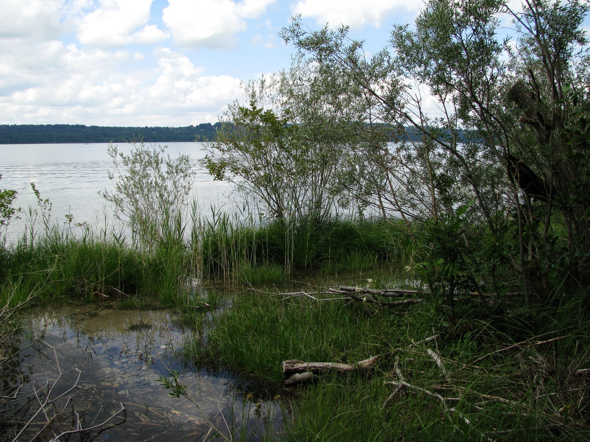 Naturschutzgebiet „Am Ostufer des Starnberger Sees“